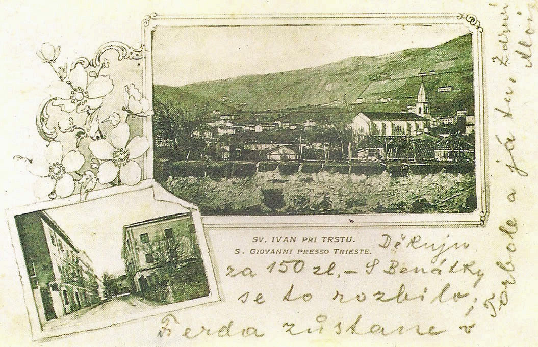 Razglednica sv. Ivana pri Trstu.